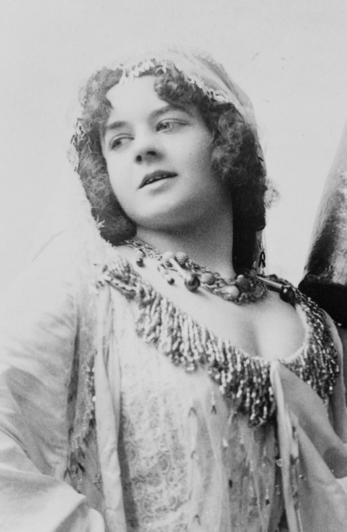 Actress Eva Tanguay